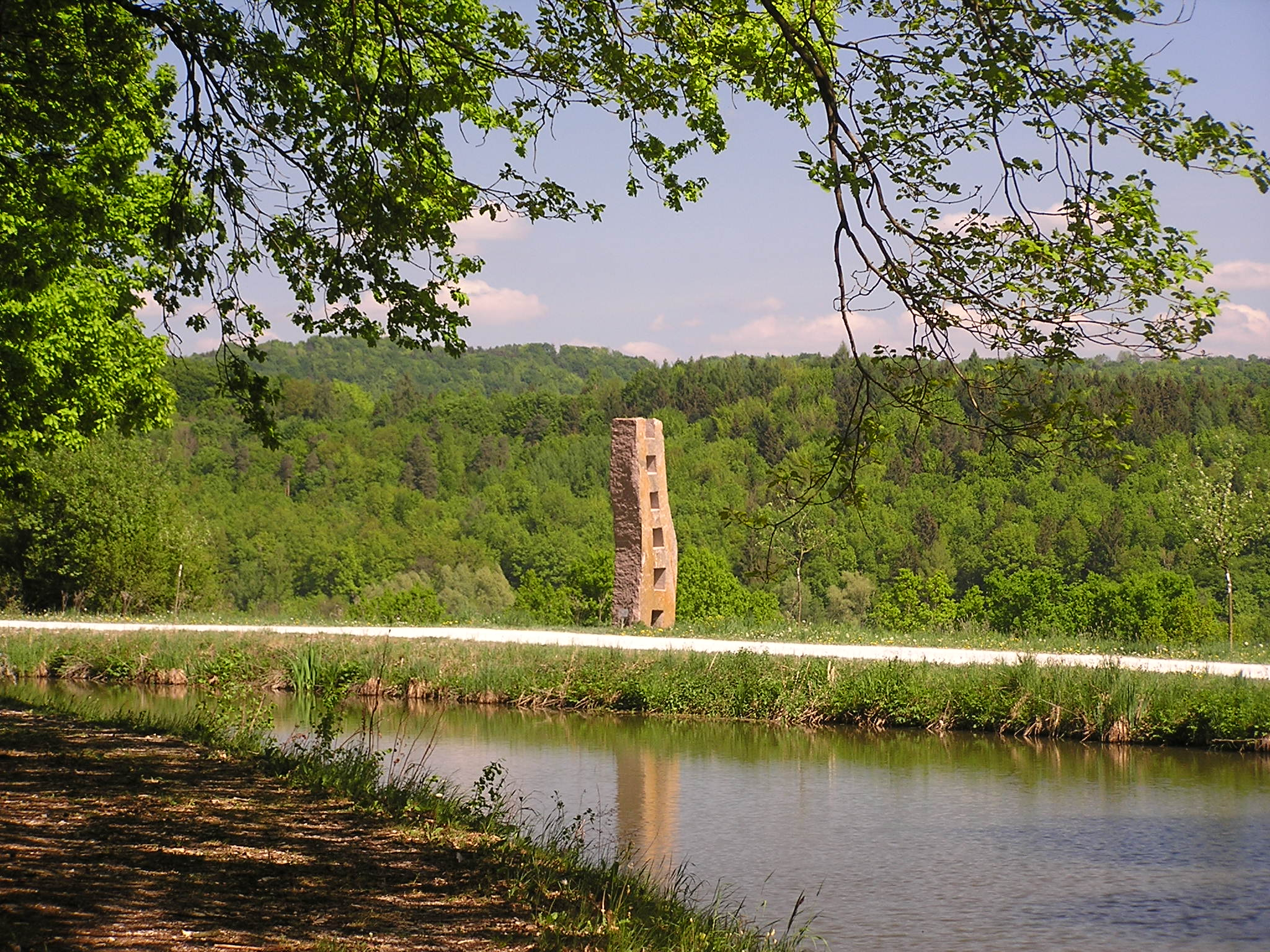 Kunst am Kanal (Ludwig-Donau-Main-Kanal), work "Himmelsleiter" (image 2)